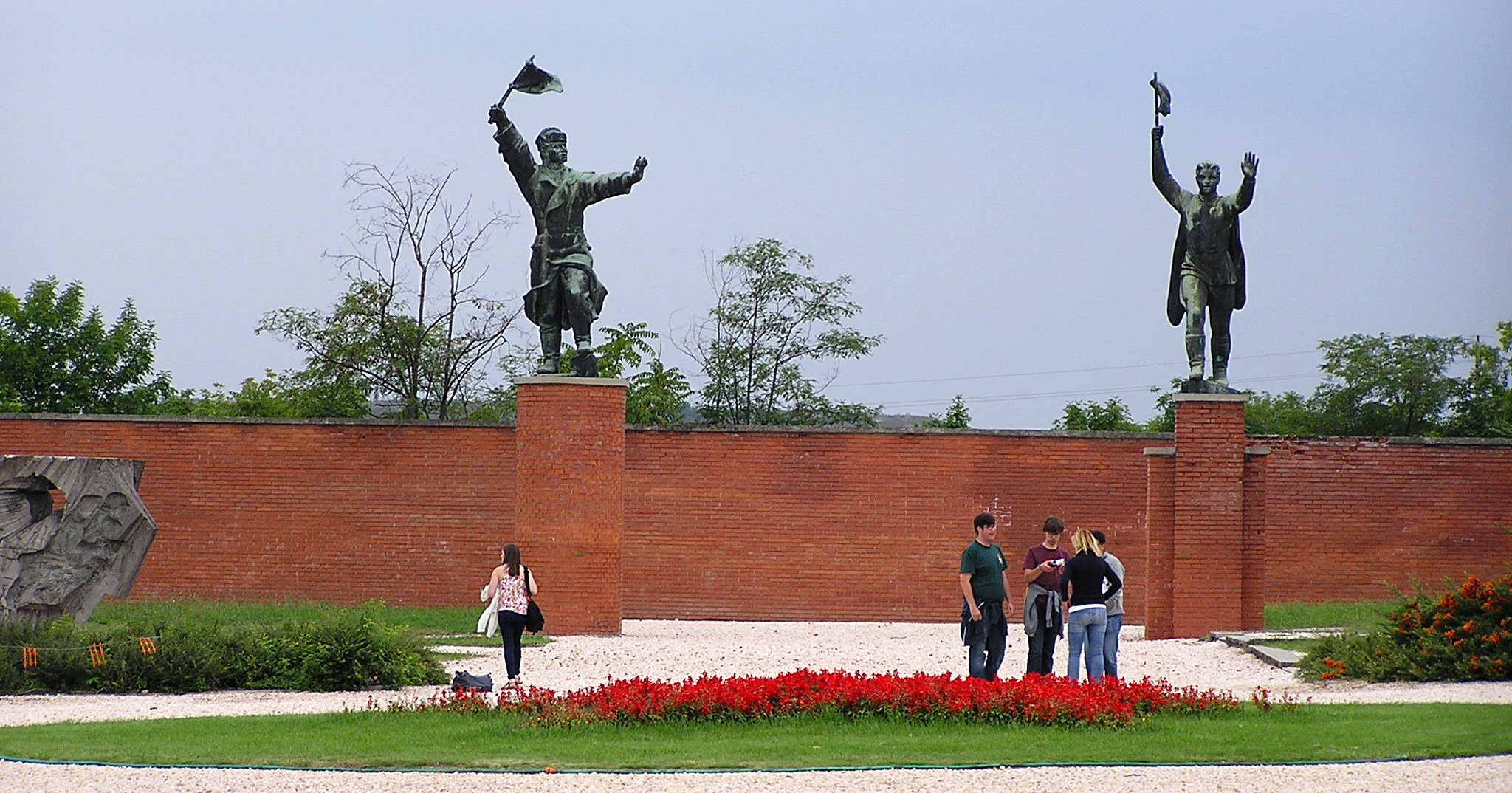 Nowhere star La stella rossa di fiori che ricorda quella che dominava la rotonda di piazza Clark Ádám (lato Buda del Széchenyl Iánchíd) ai piedi del cammino senza uscita inquadrato dal capitano Steinmetz e Osztapenkó